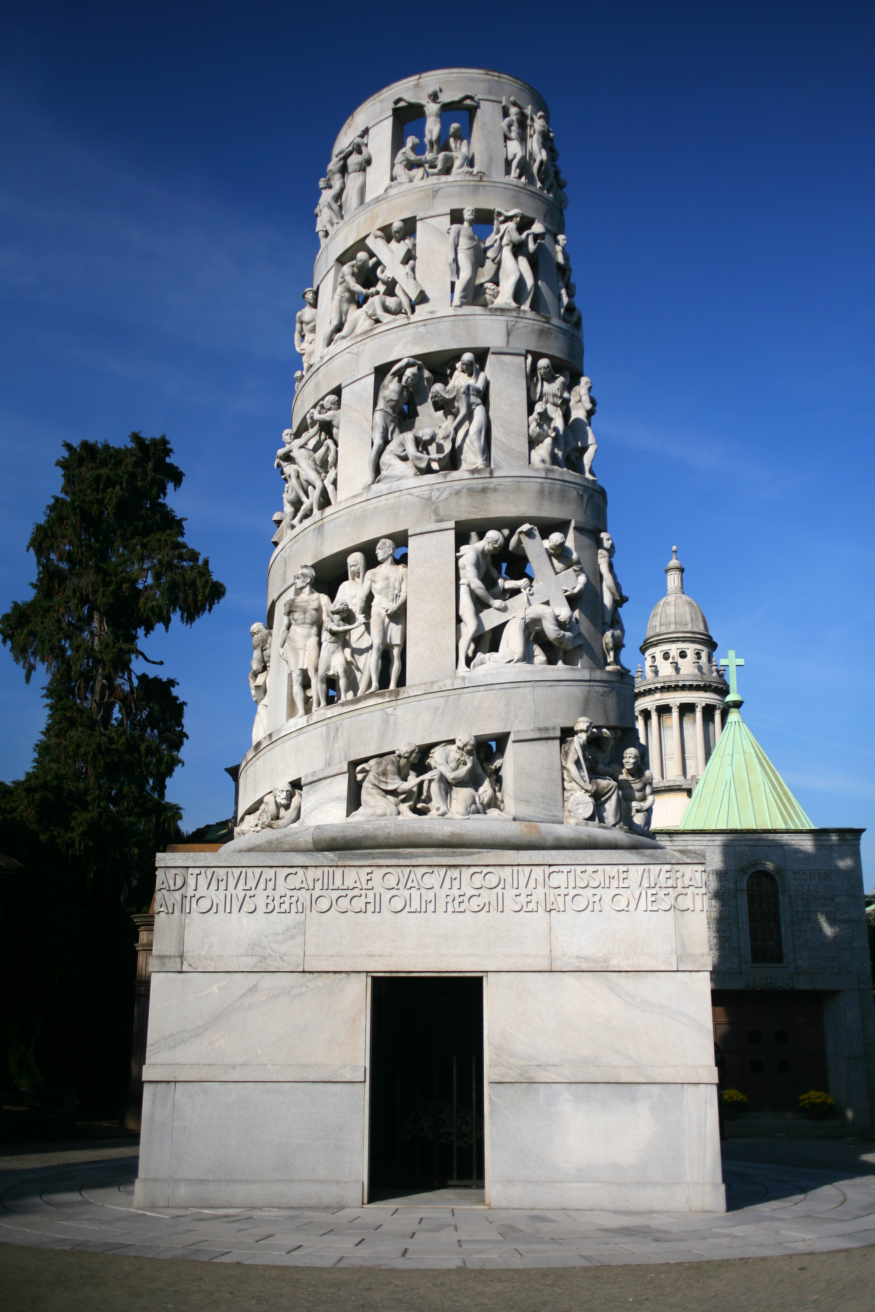 Monumentale di Milano Edicola Antonio Bernocchi (1936); Arch. Alessandro Minali, scultore Gianino Castiglioni